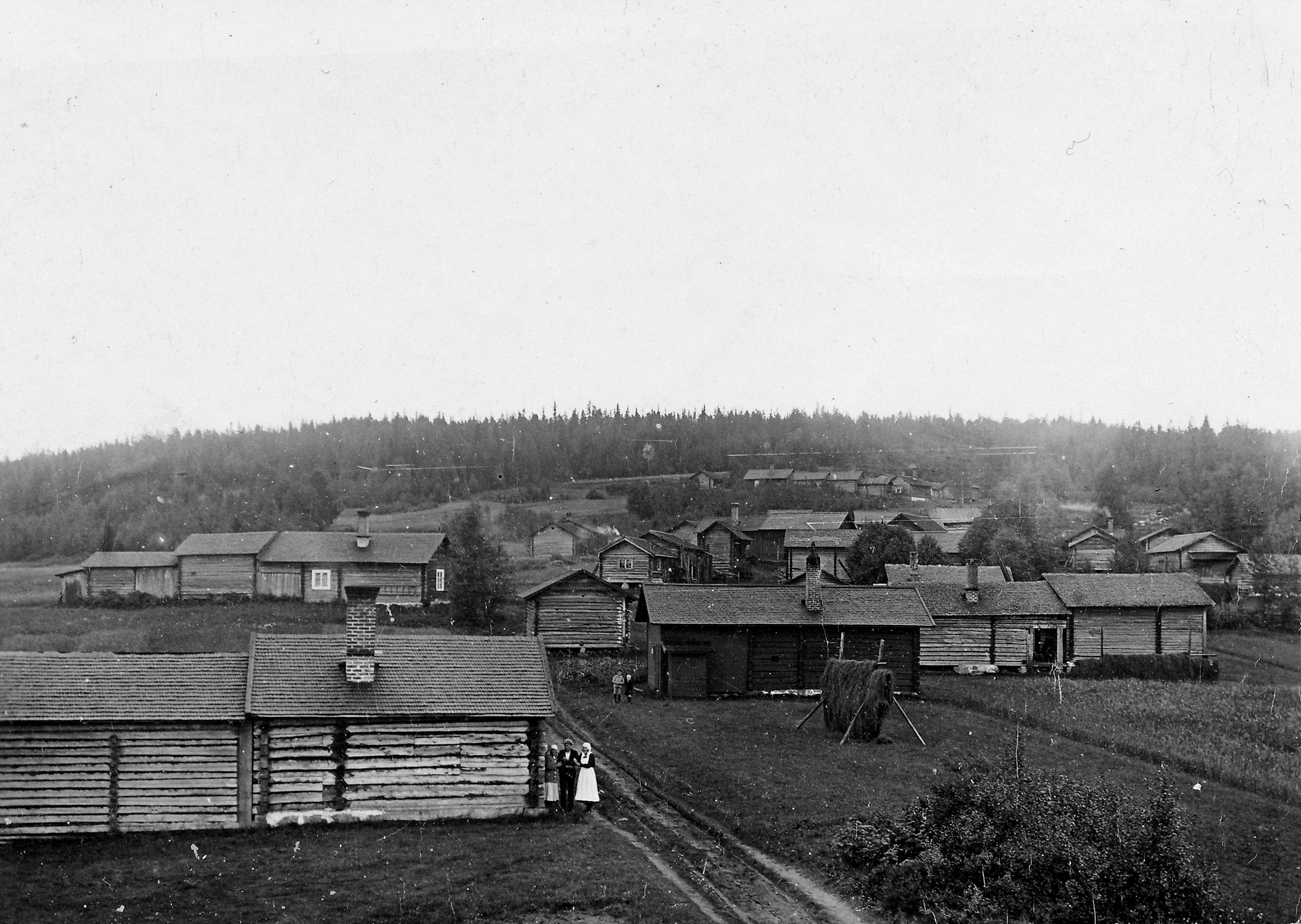 Hökbergs fäbodar omkring 1920.